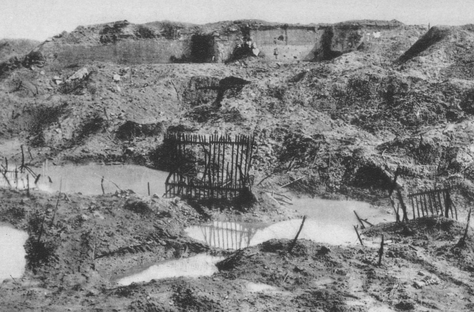 Ouvrage Froideterre